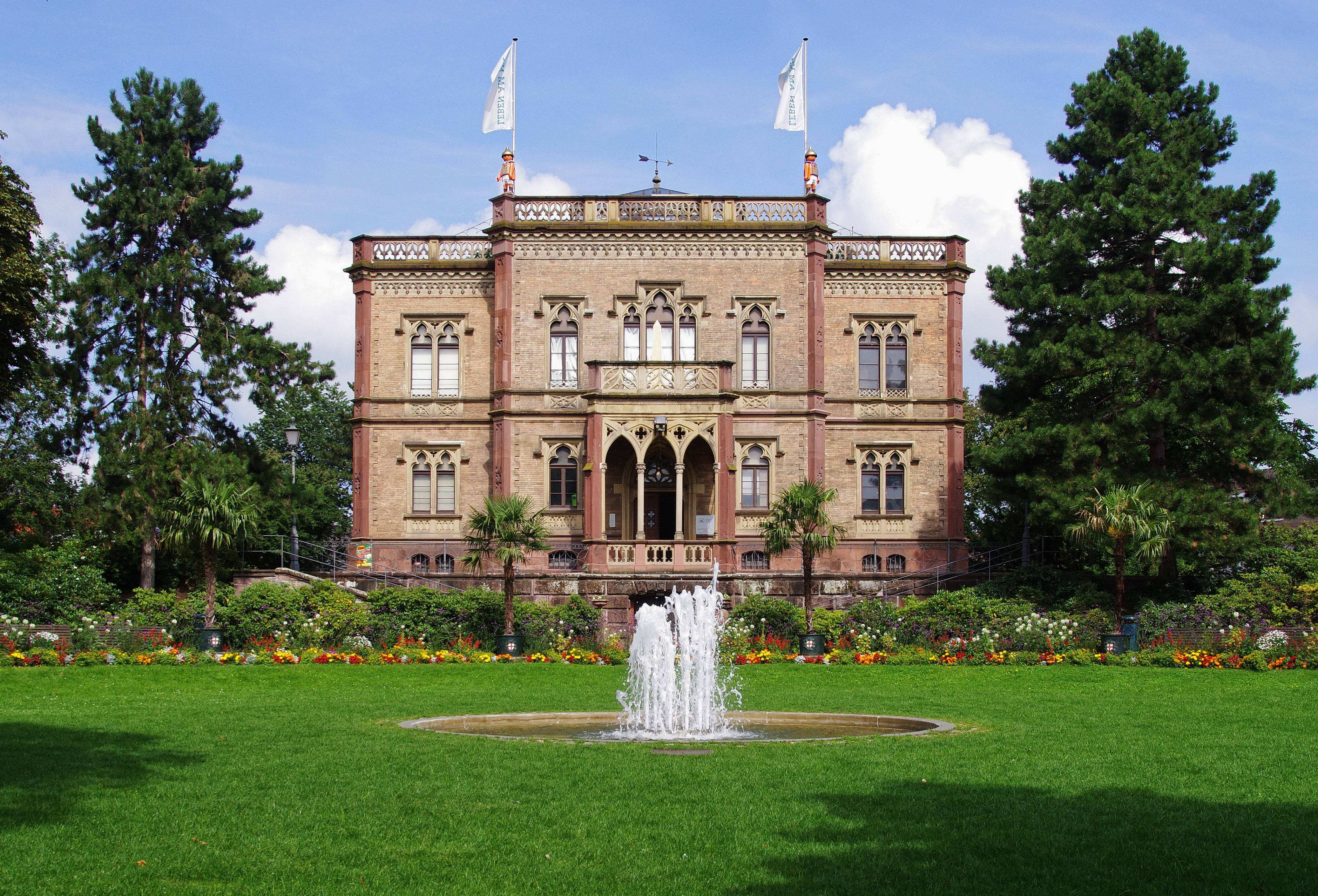 Frontansicht des Colombischlößchen